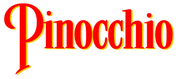 Das Logo des Disneyklassikers Pinocchio